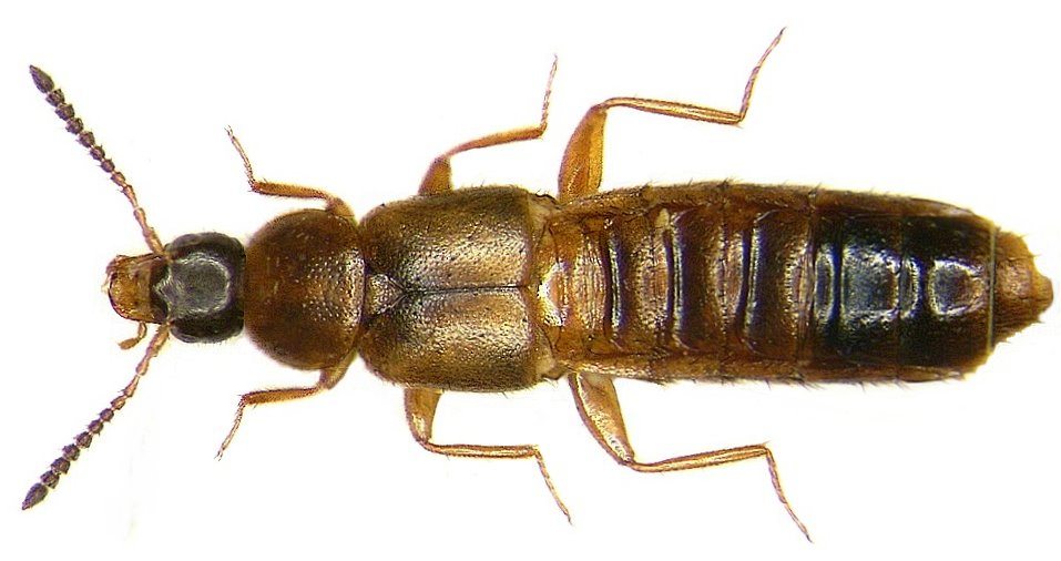 Familie: Staphylinidae Grösse: 3-4,5 mm Verbreitung: Europa Ökologie: unterirdische Lebensweise Fundort: Germania, Oberfranken, Kulmbach leg.det. U.Schmidt, 1983 Foto: U.Schmidt, 2006